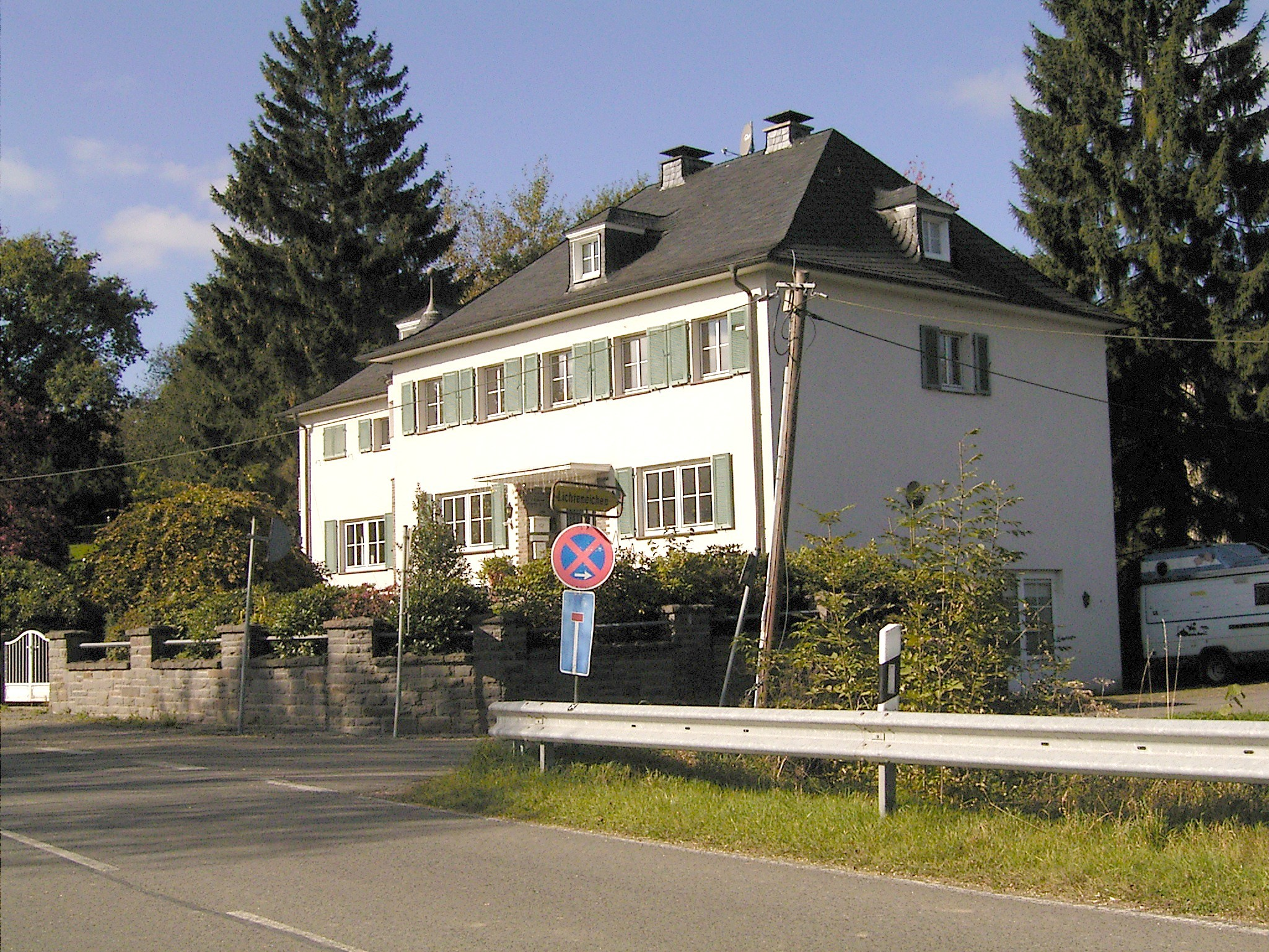 Radevormwald